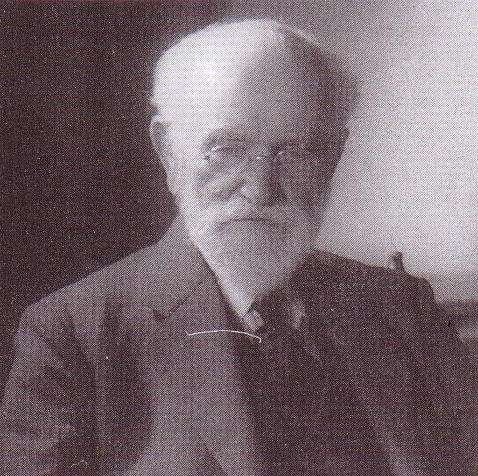 Porträtfotografie von Albert Geyer